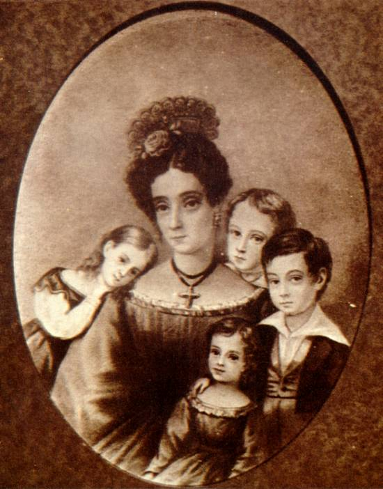 Gabriela Frederica Ribeiro de Andrada and soons(A daughter of Jose Bonifacio de Andrada e Silva)